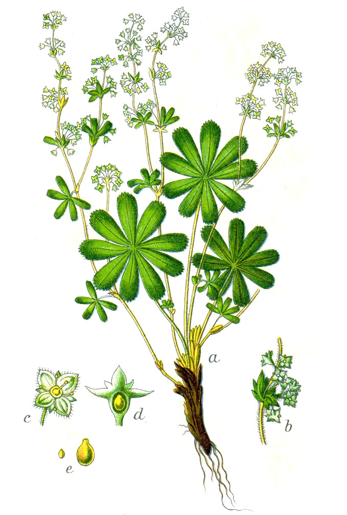 Alchemilla alpina L. Original Caption Alpen-Sinau, Alchemilla alpina